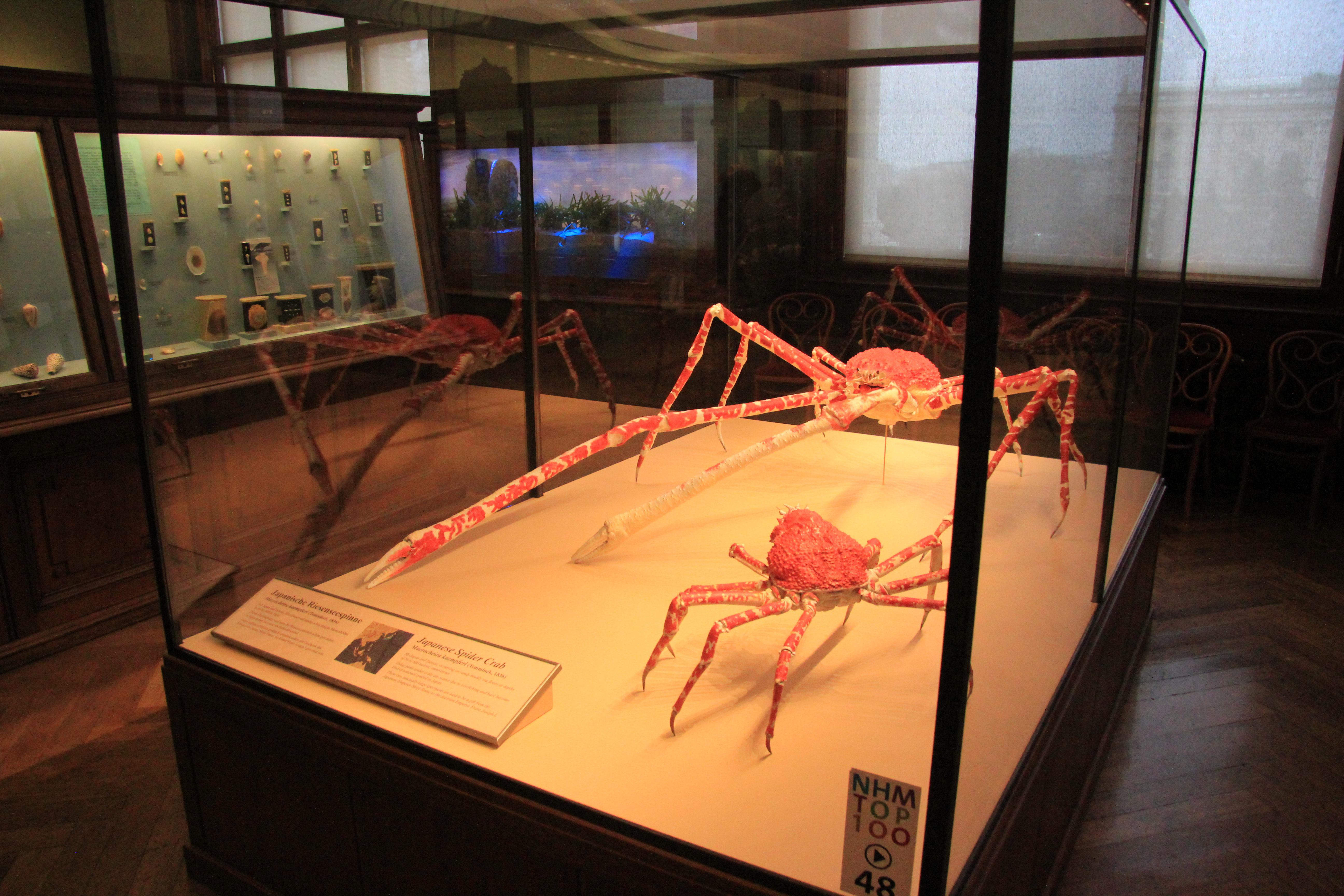 Exponate im Naturhistorischen Museum Wien